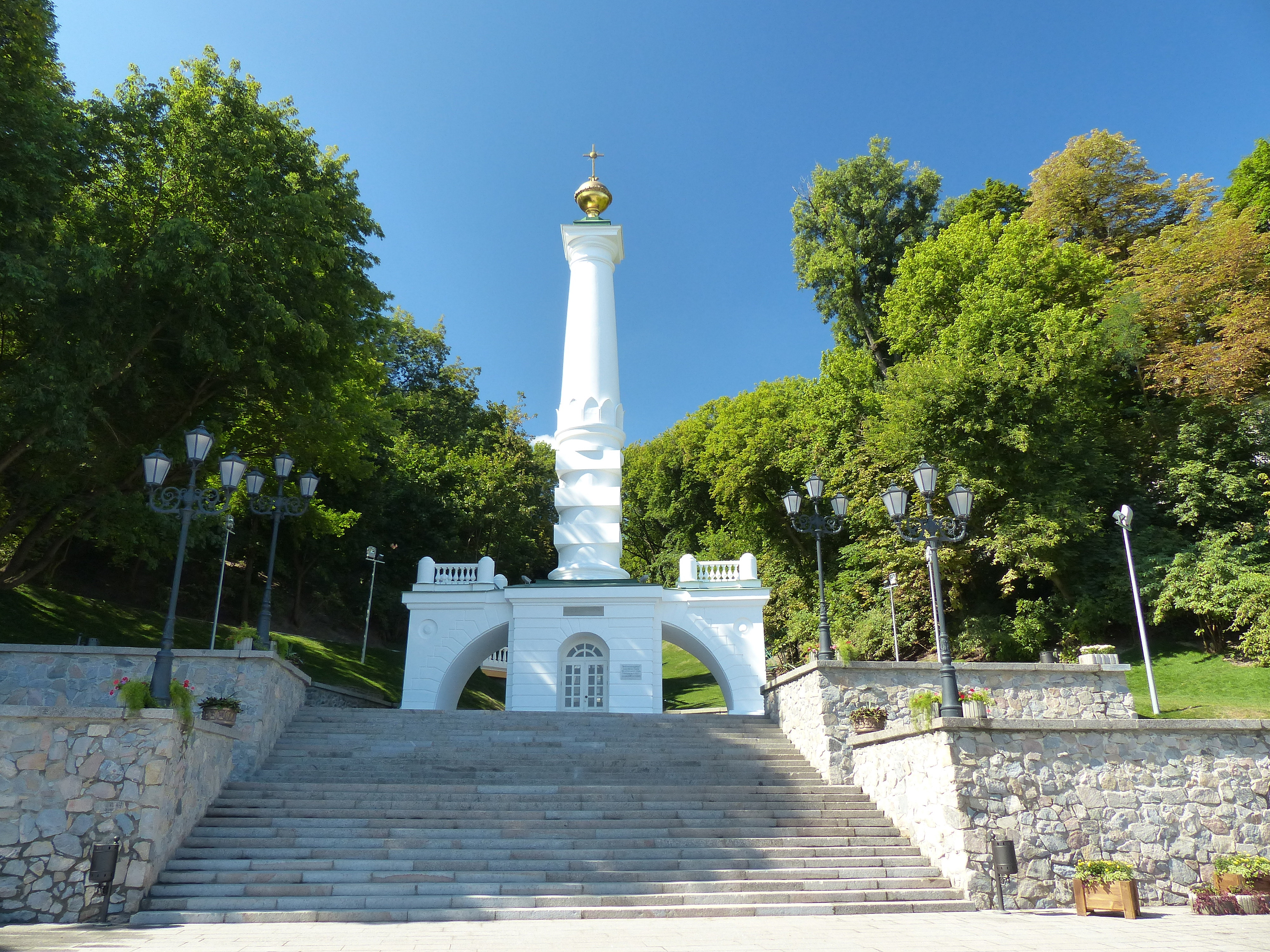 Монумент на честь надання м. Києву Магдебурзького права, Київ, Набережне шосе, 8